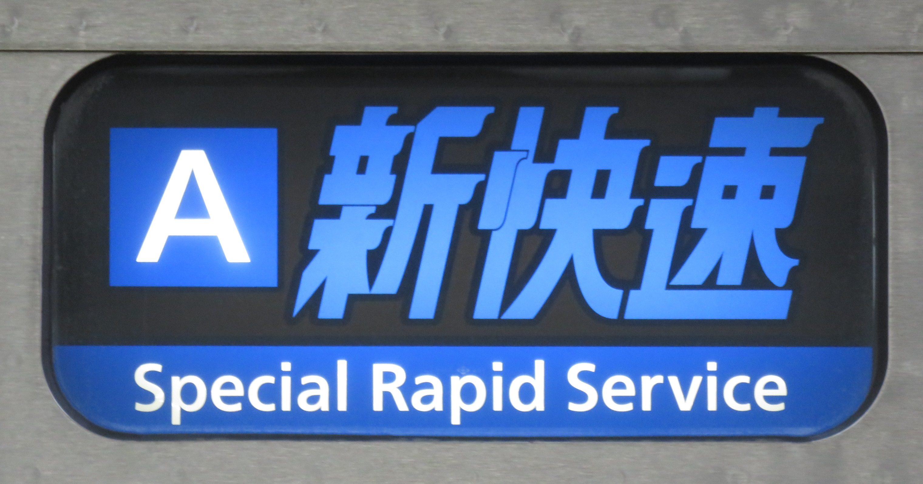 JR西日本 路線記号対応「新快速」表示（223系）